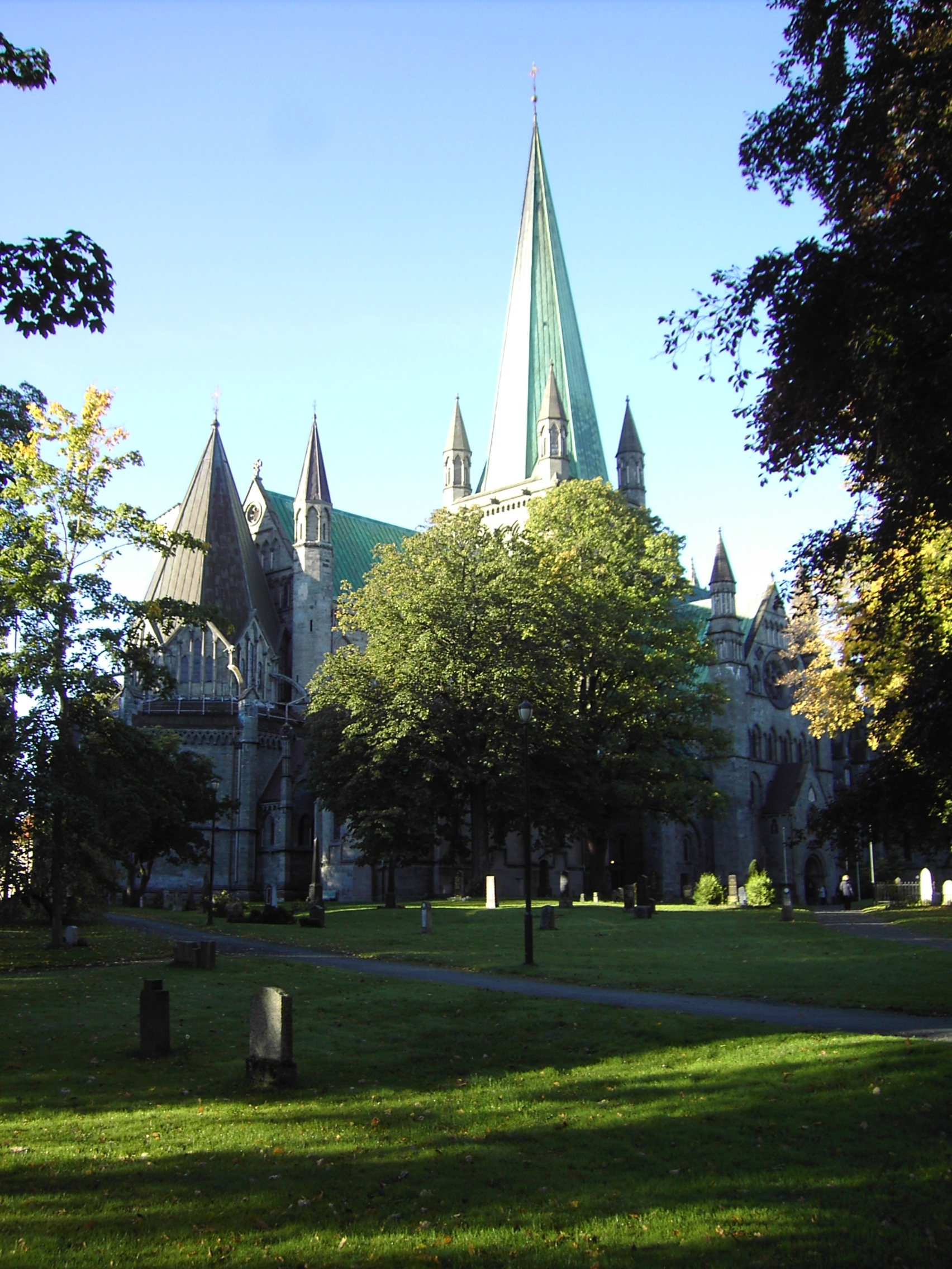 Trondheim, Norwegen,Nidaros-Dom